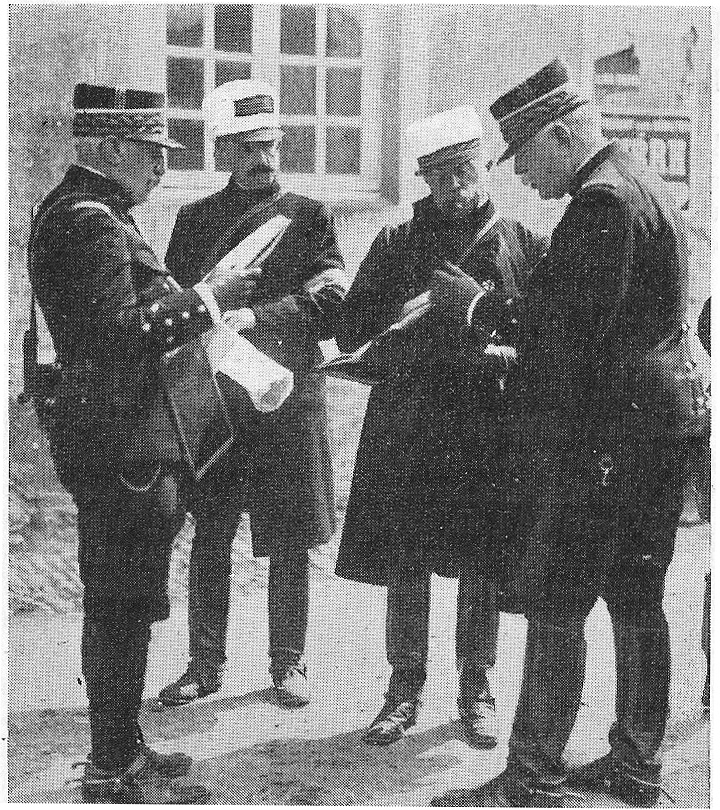 N° d'Août_32_p24_du Crapoulliot, les généraux Castelnau_Sordet_Joffre.